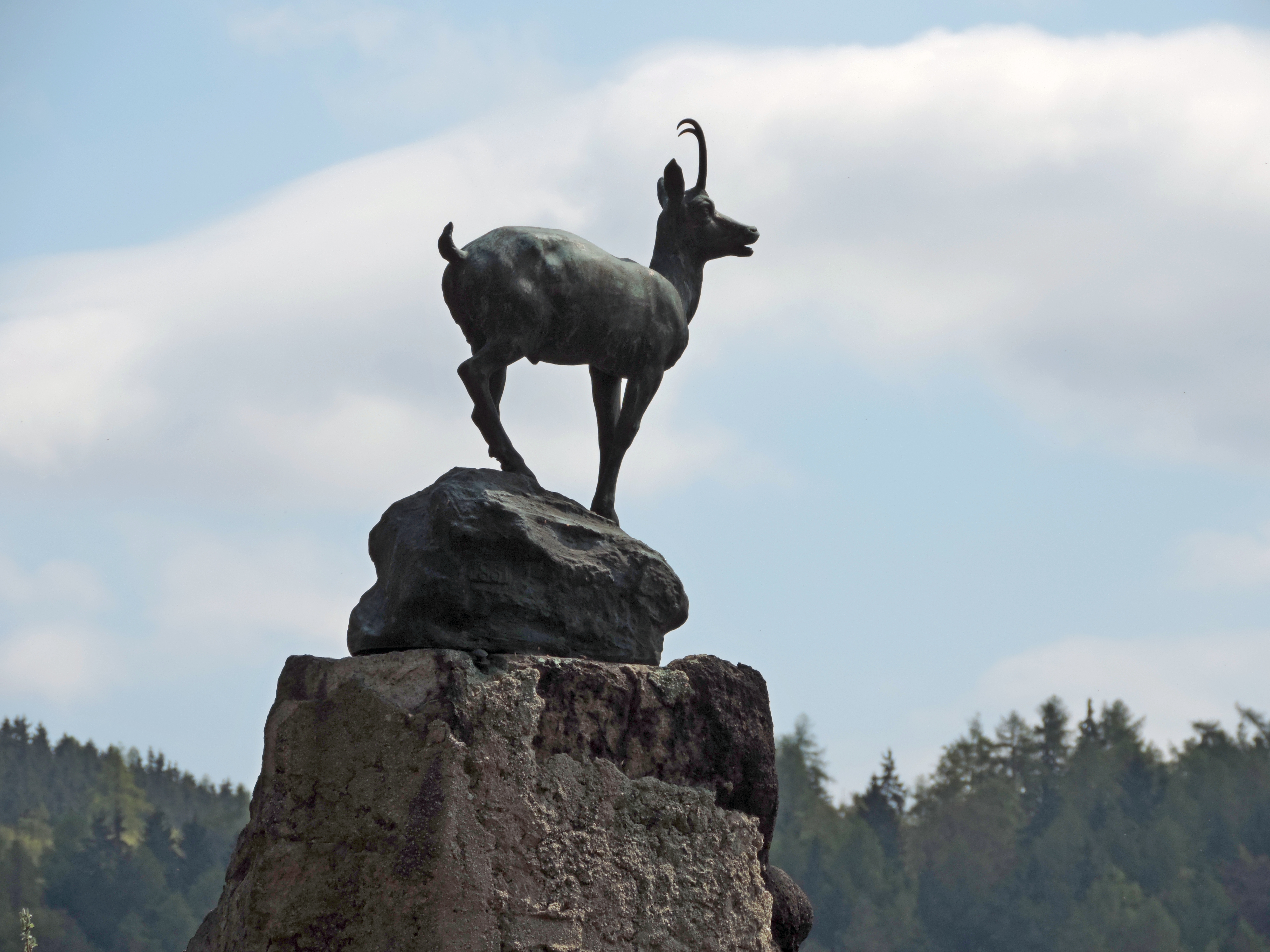 Kamzík